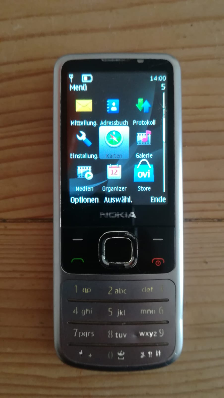 Nokia 6700 Classic - Chrome Silver